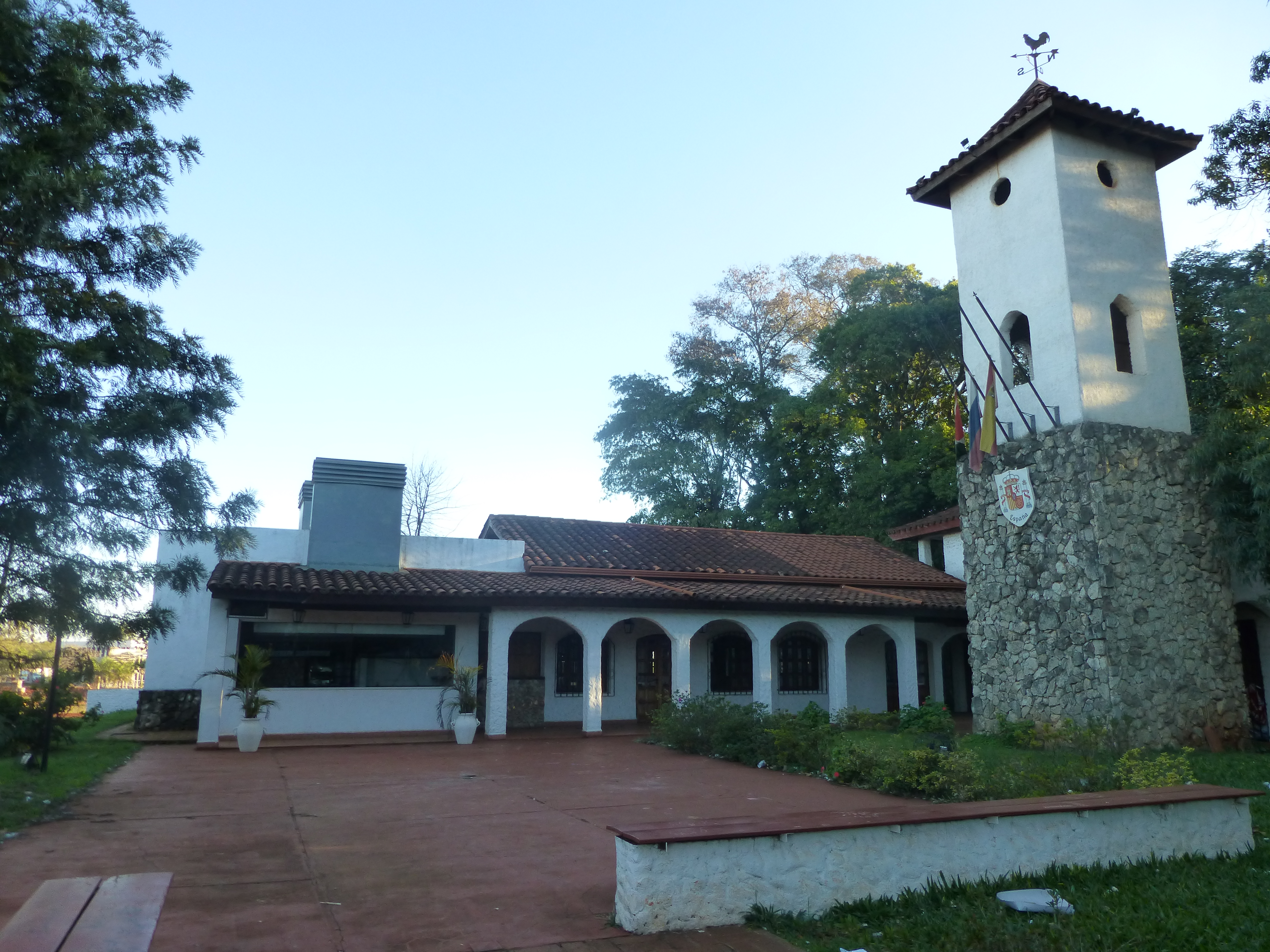 Parque de las Naciones